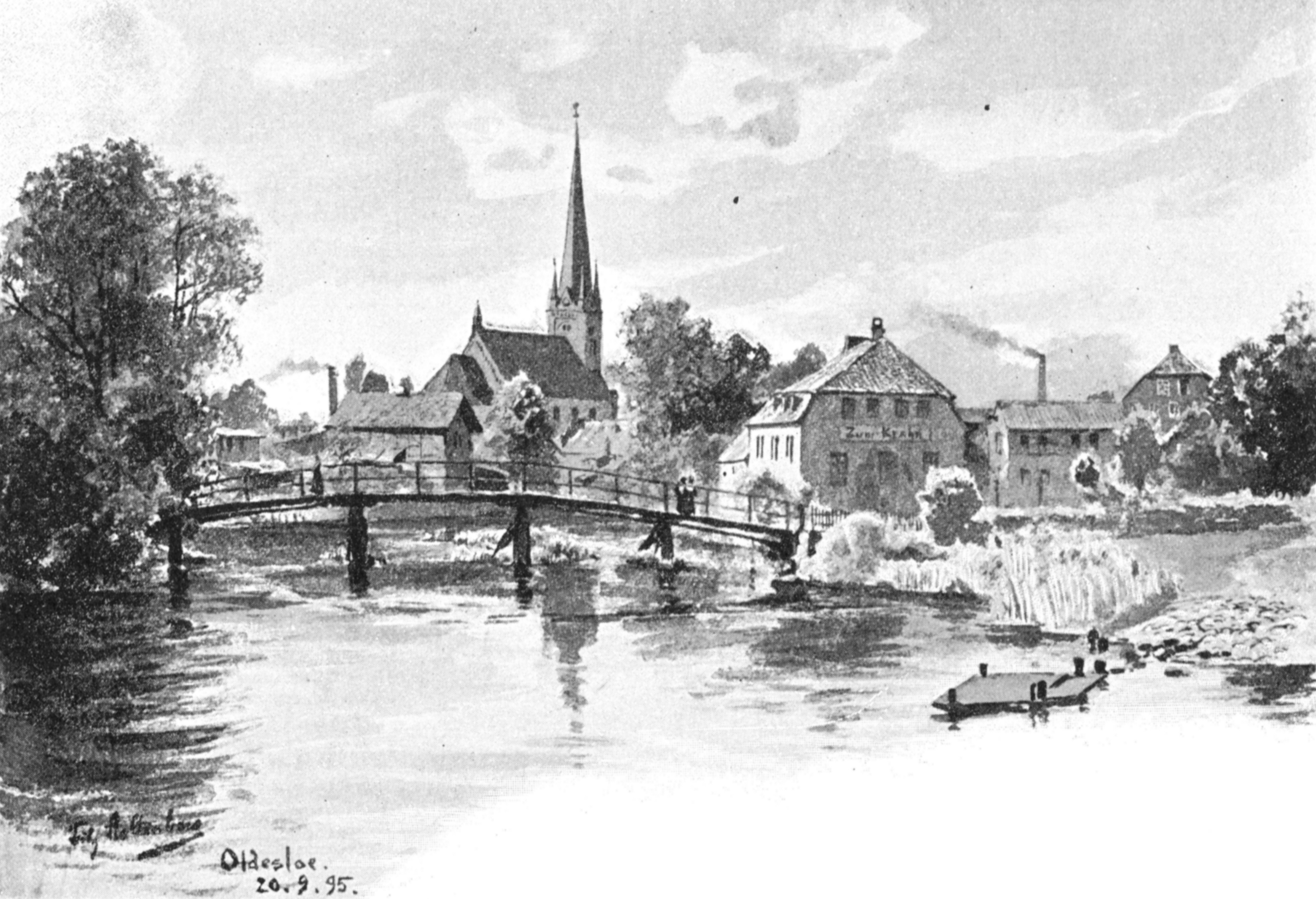 Oldesloe an der Trave um 1895, gezeichnet von Fritz Stoltenberg